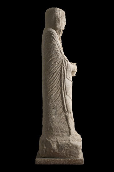 Dama Oferente del Cerro de los Santos (Cultura Ibérica). Número de inventario: 3500.